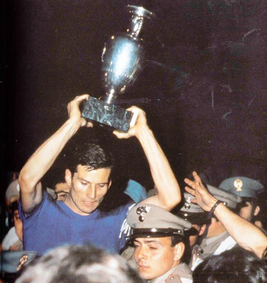 Il capitano dell'Italia, Giacinto Facchetti (in primo piano), solleva la Coppa Henri Delaunay dopo la conquista del terzo campionato europeo di calcio, vinto dagli Azzurri in finale contro la Jugoslavia, superata per 2-0 allo stadio "Olimpico" di Roma nella ripetizione (1-1 d.t.s.) del 10 giugno 1968.